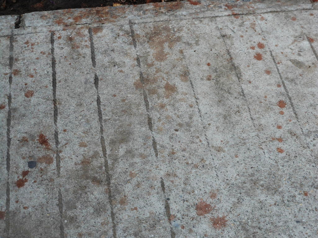 Betel Nut Stains